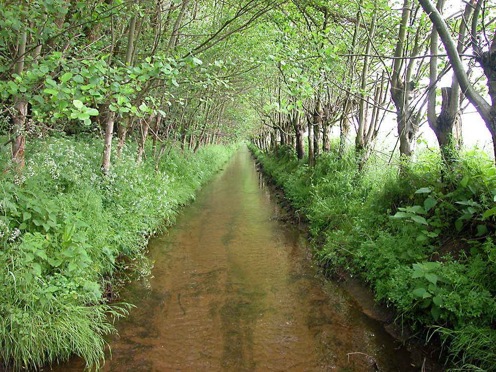 Bach Velbruchbach. Dorsten-Rhade. West.